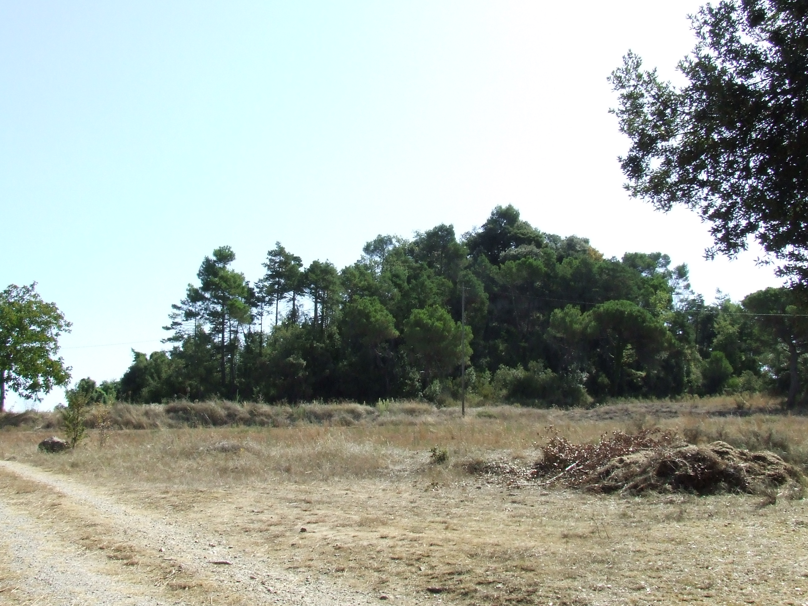 El Turó de Torroella (Castellcir, Moianès)